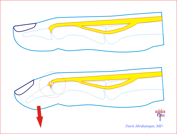 Մրճանման մատի զարգացման մեխանիզմը տարածիչ ջլի փակ վնասման դեպքում